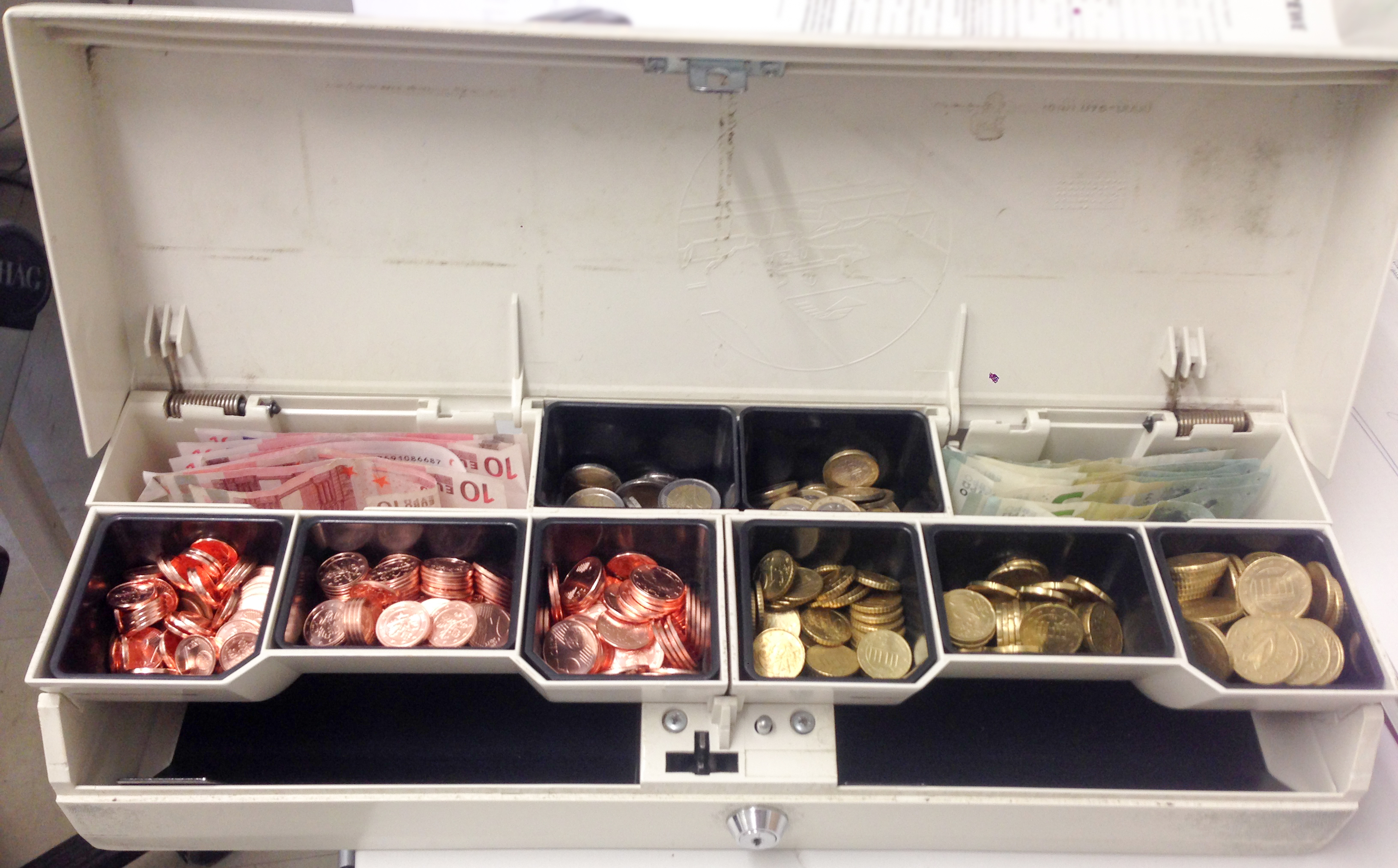 Kassenlade eines Deutschen Handelsunternehmens